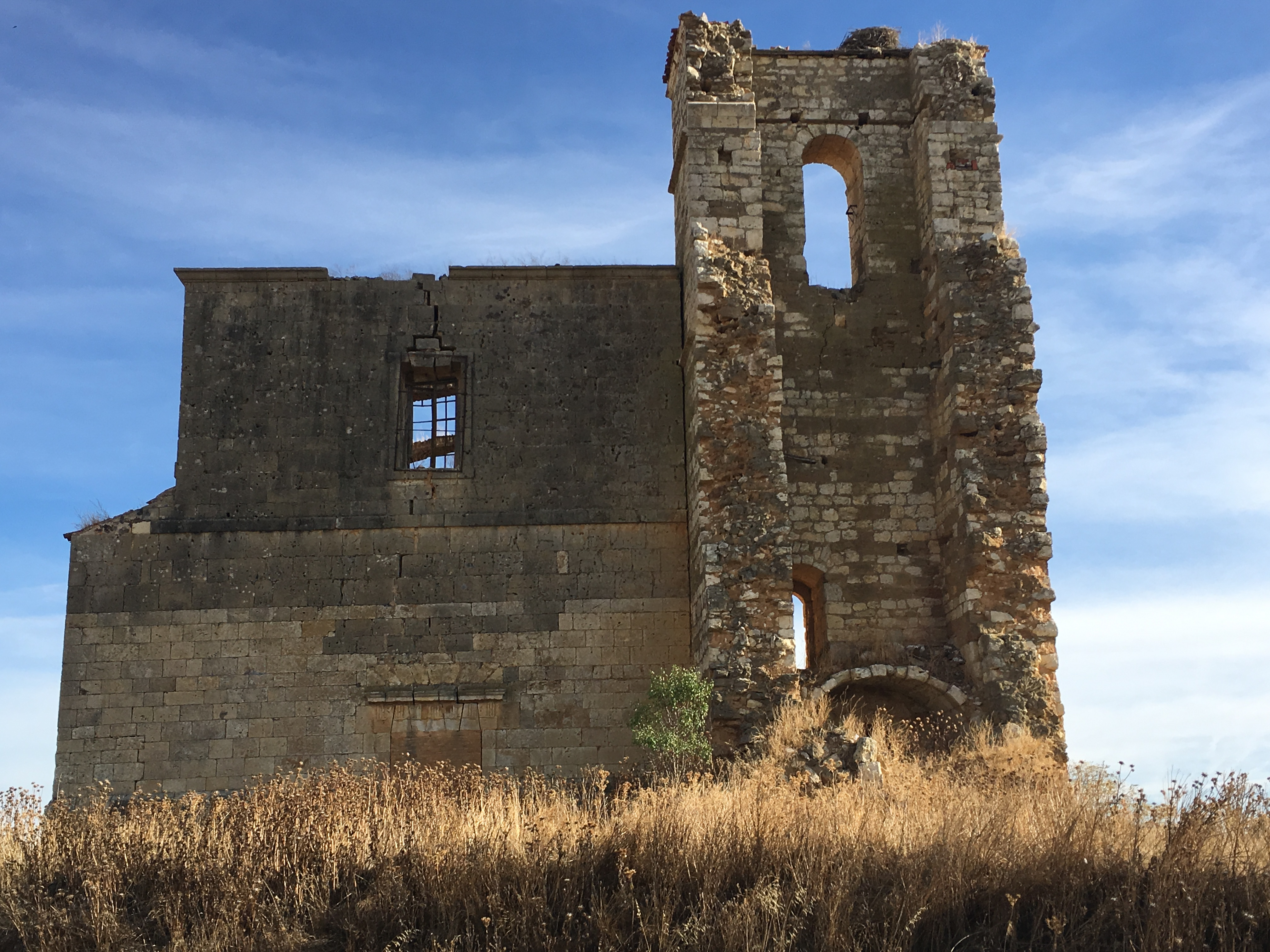 Villaesper Milenario